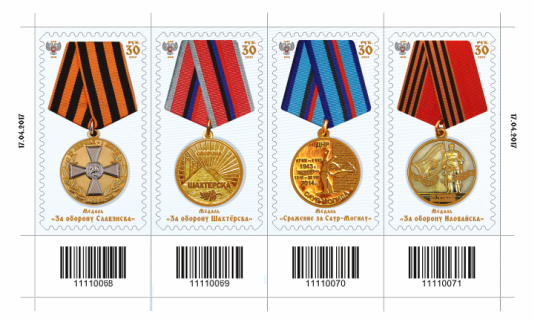 Блок марок «Медали ДНР»